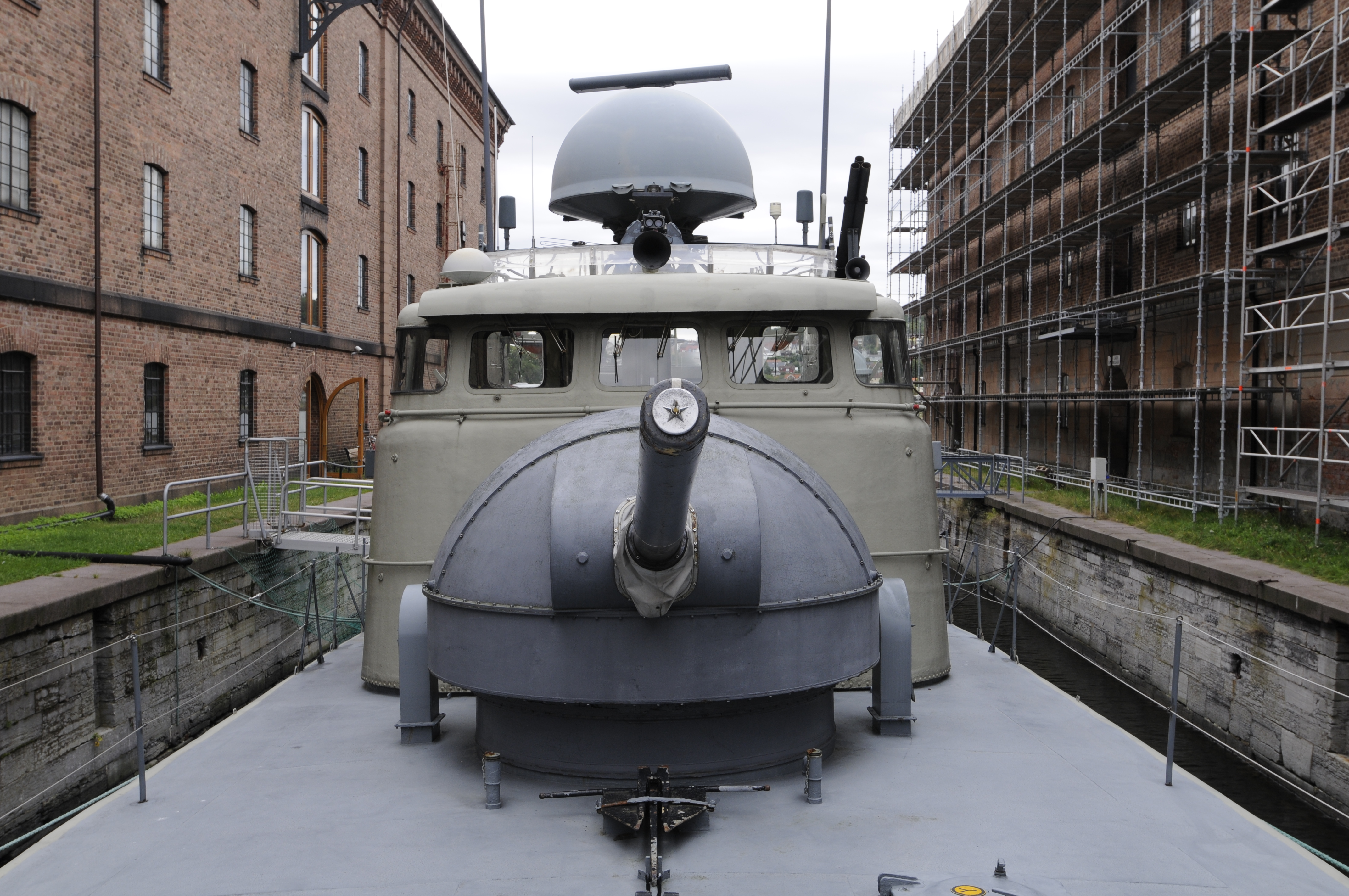 KNM «Blink» (P961) utenfor Horten marinemuseum